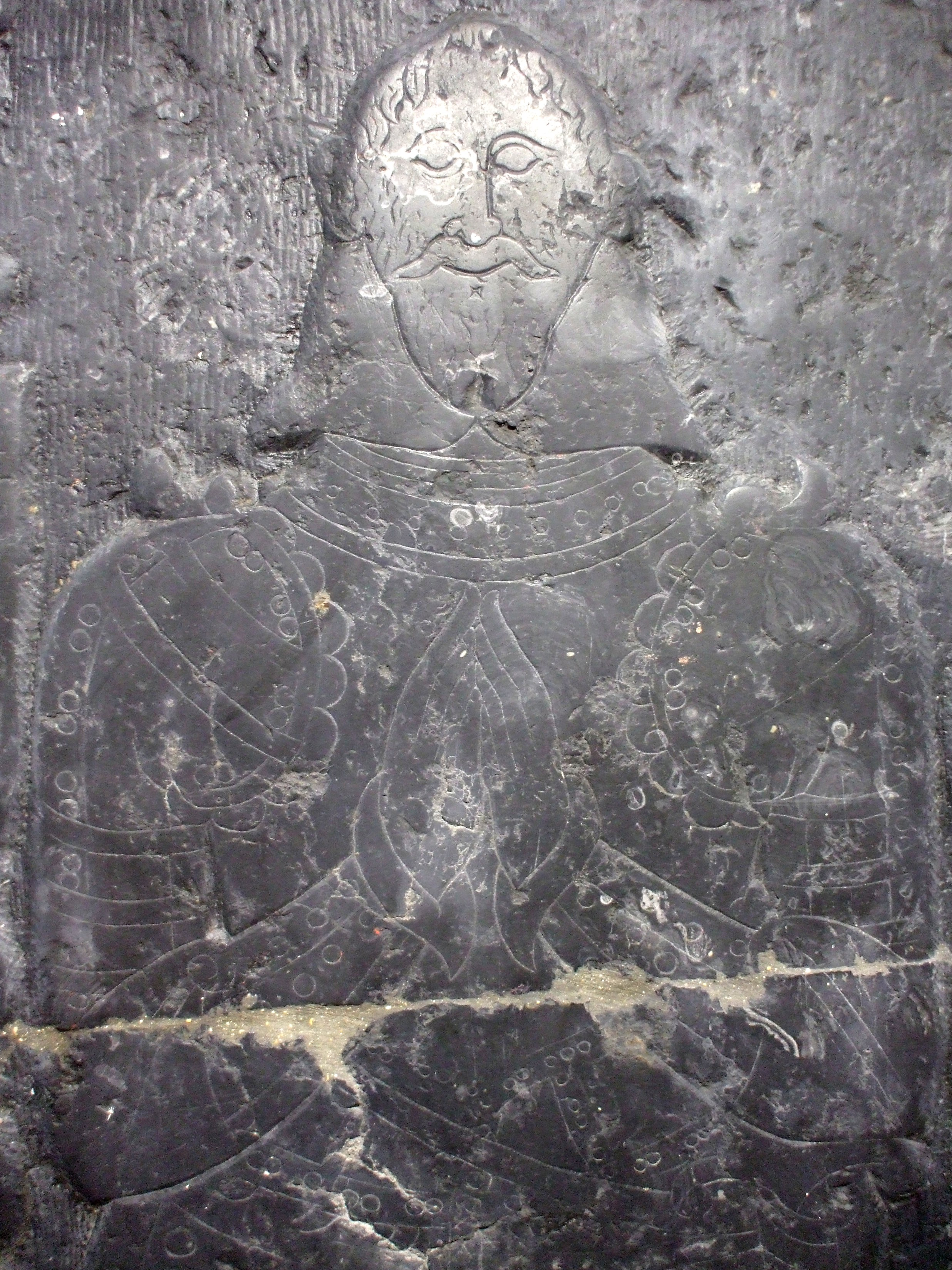 Pierre tombale de Jean Rasoir seigneur de Beuvrages ,Jean Rasoir haut, Hainaut, monument historique